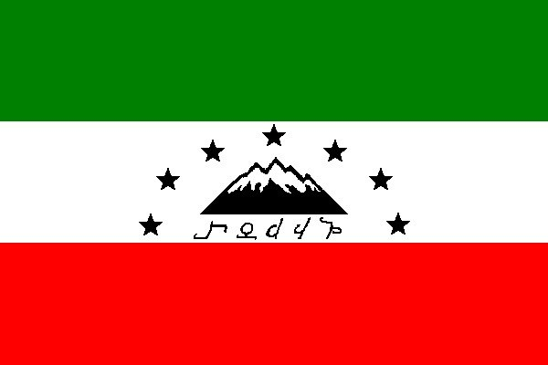 Флаг цахурского народа представляет собой прямоугольное полотнище, разделенное на 3 равные полосы зеленого, белого и красного цветов. Полосы расположены одна под другой горизонтально в следующем порядке: зеленая, белая, красная. На белом фоне в центральной части флага размещены горы, над ними семь звезд, а внизу агванским письмом написано ЦАХУР. Зеленый цвет - символизирует Ислам. Белый цвет - знания, Цахурское медресе университетского типа было первым высшим учебным заведением на Северном Кавказе, став одним из исламских центров Халифата. Красный цвет - многолетняя борьба малочисленного цахурского народа за свою независимость, множество войн через которые цахурский народ прошел.